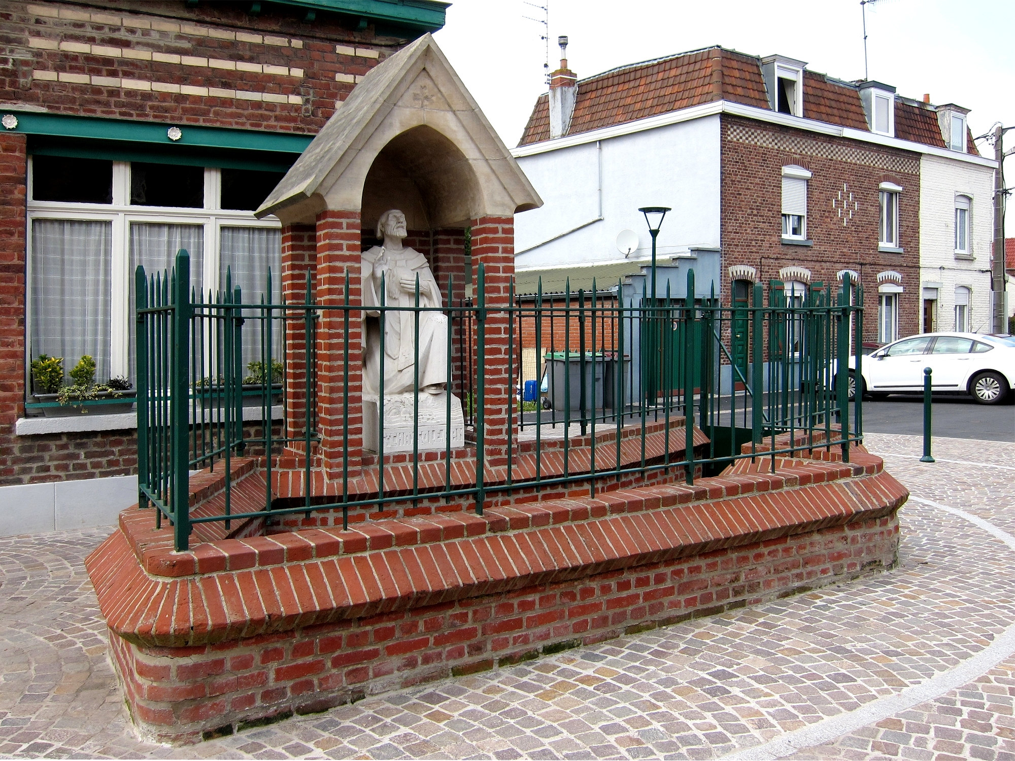 La fontaine Saint Chrysole à Verlinghem (Nord).